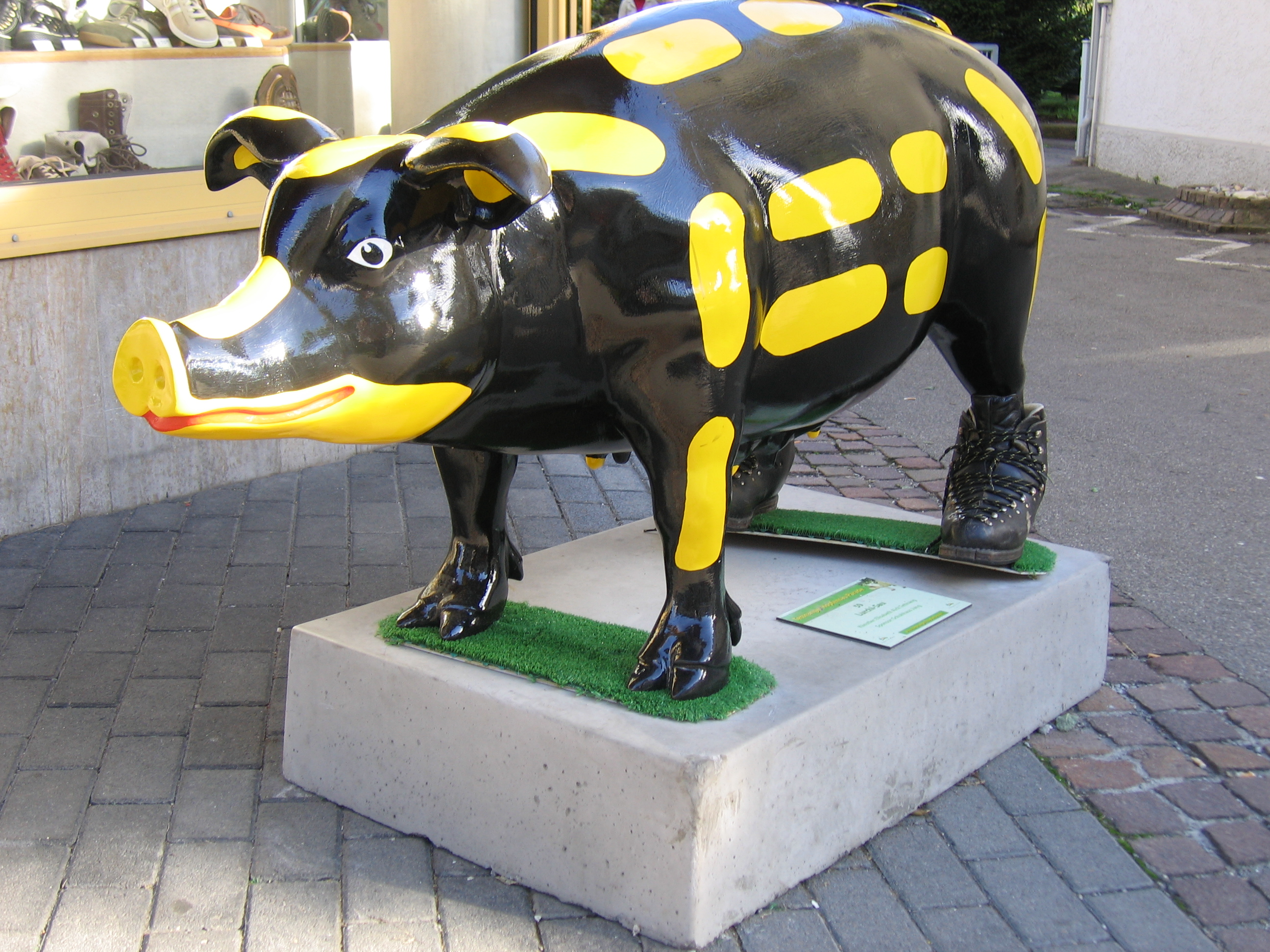 Deutschland - Baden-Württemberg - Bodenseekreis - Tettnang: Hopfensauparade (2006) - "Lurchi-Sau" Künstler/in: Elisabeth Aich, Tettnang Besitzer/Sponsor: Schuhhaus Jung, Tettnang